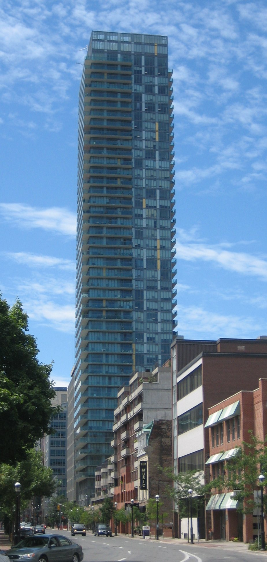 SP!RE